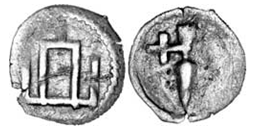 Дынарый Вітаўт з выявай калюмнаў.